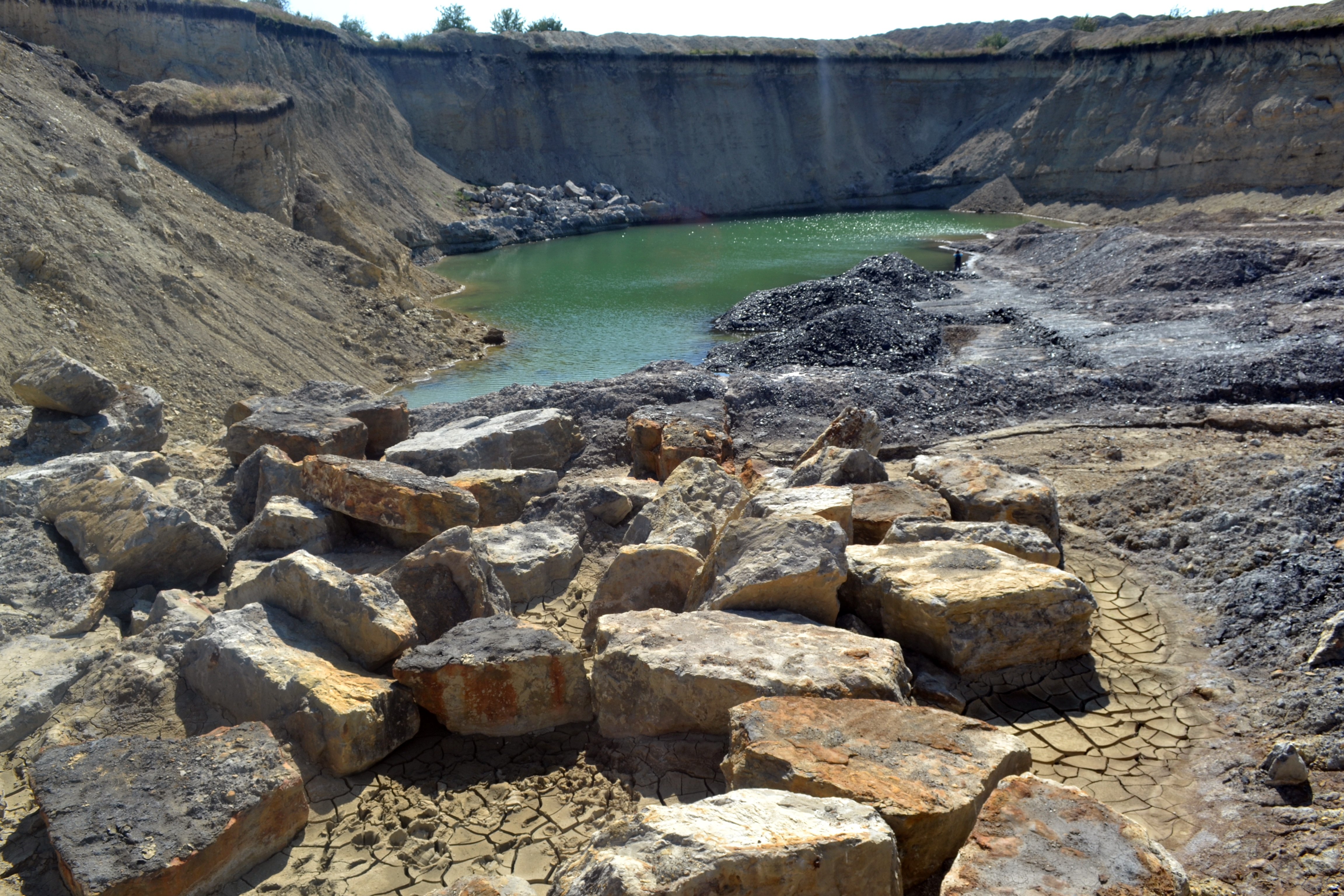 Копанки поблизу м.Лисичанськ